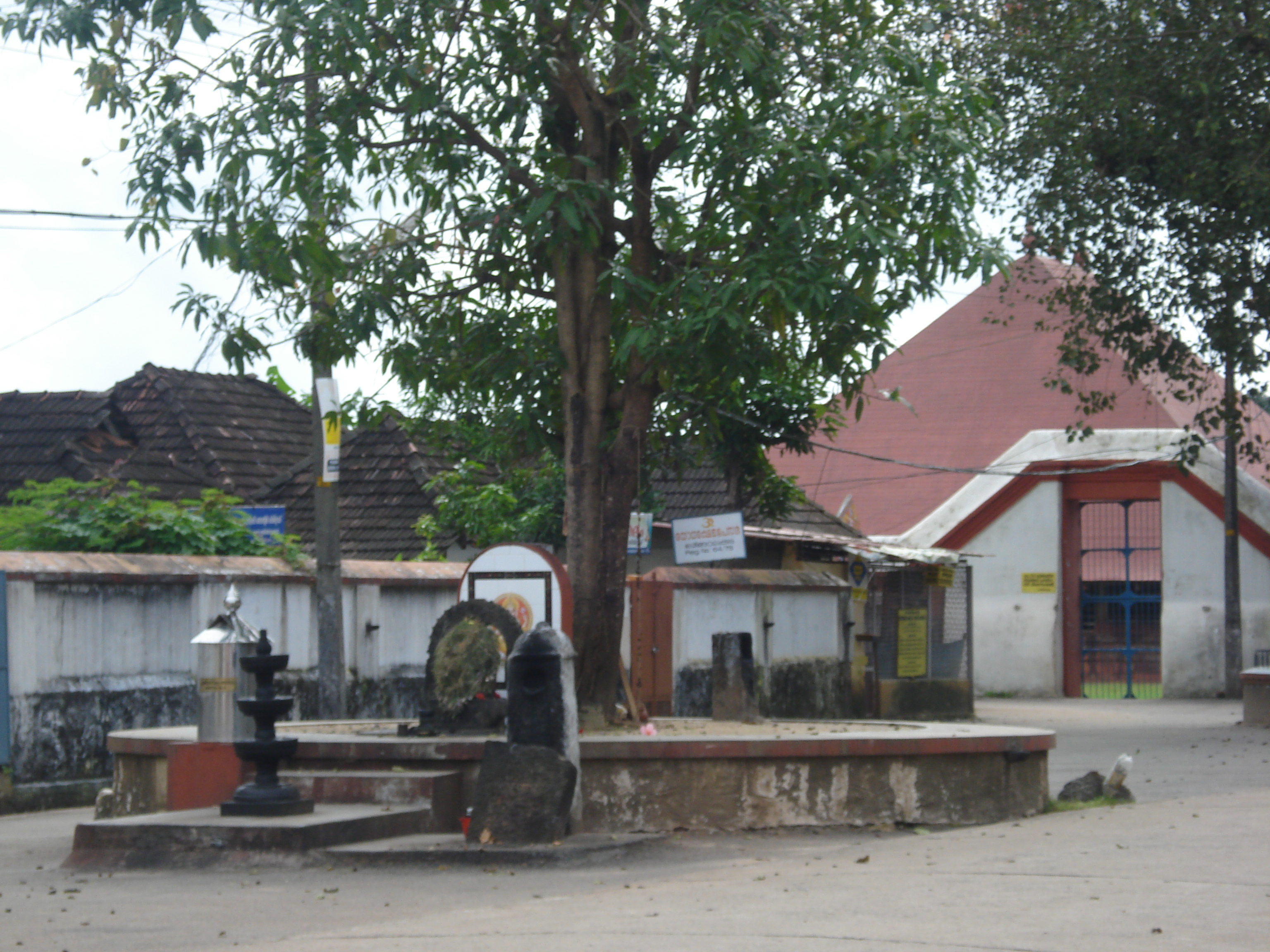 ക്ഷേത്രത്തിൻറെ നടയ്ക്കുള്ള ആലിൻ ചുവട്ടിൽ ഗണപതി.